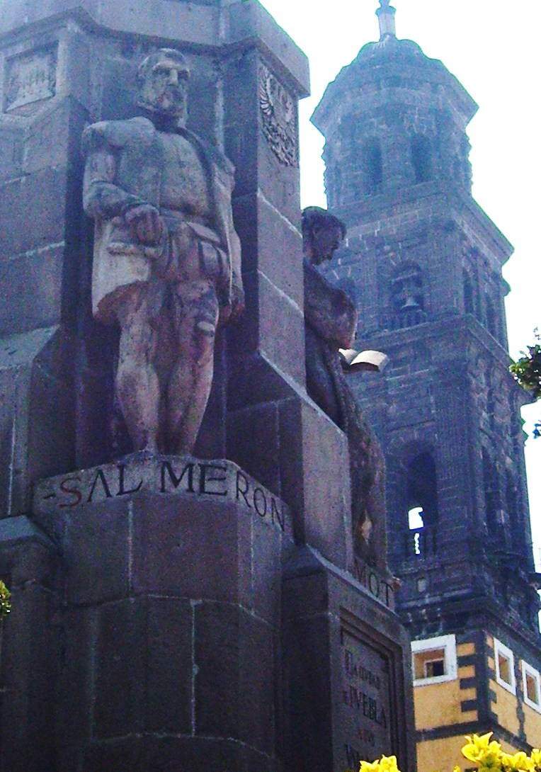 El Licenciado Juan de Salmerón, fundador de Puebla